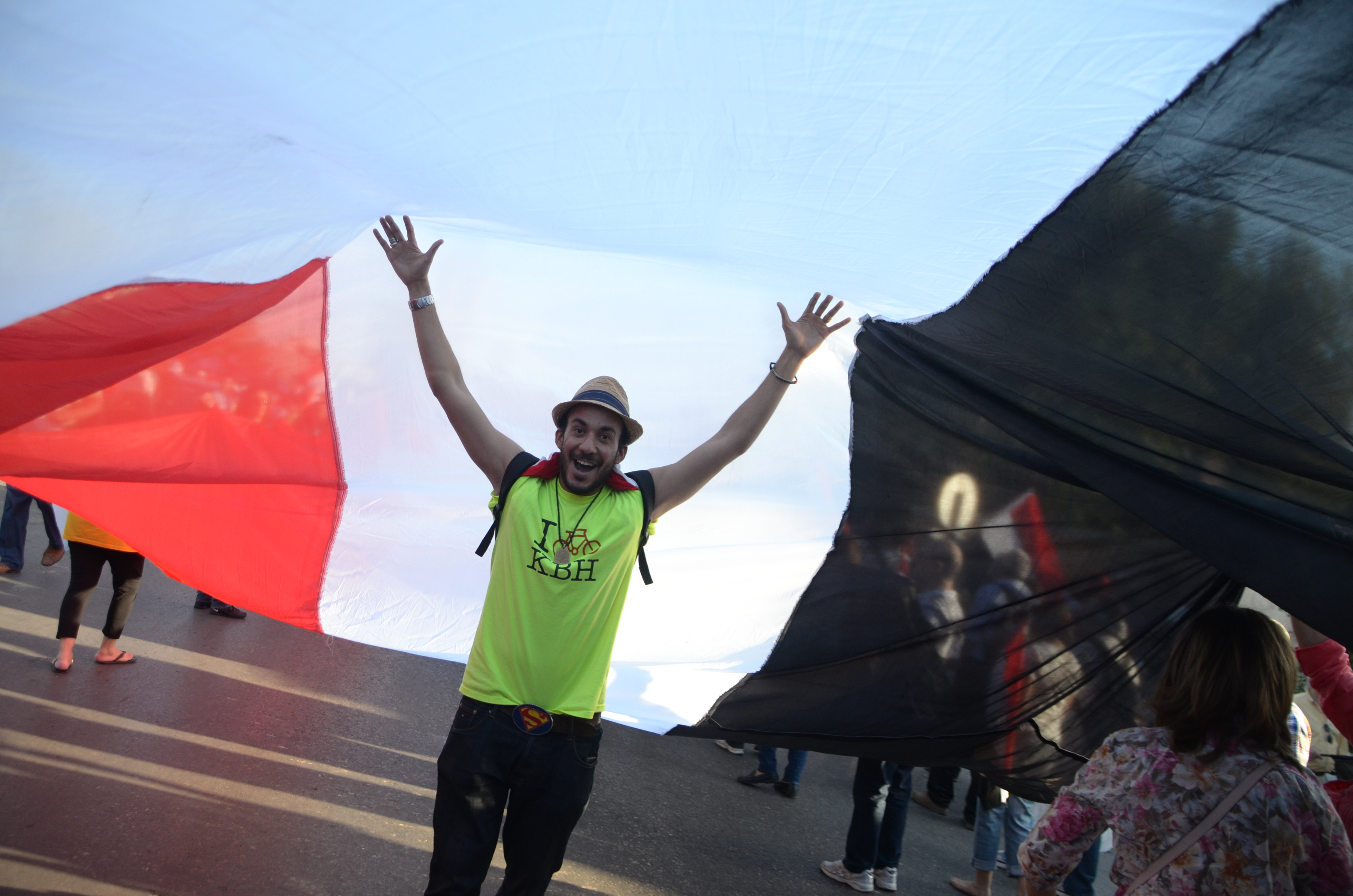 حجاجوفيتش في الإتحادية 26 يوليو 2013